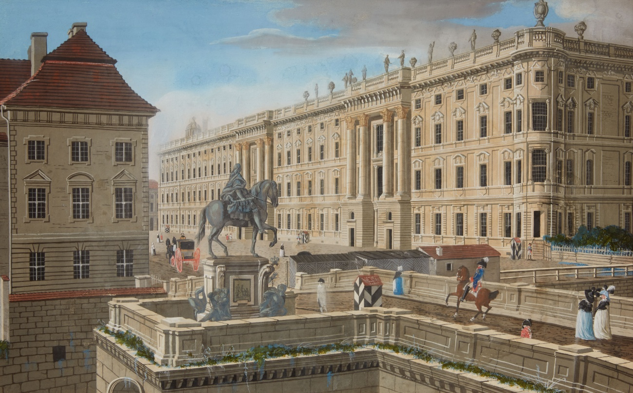 Berlin, Berliner Schloss und Denkmal des Großen Kurfürsten Gouache auf einer Radierung von Johann Georg Rosenberg. 39,5 x 62,8 cm. Signiert und datiert unten links: J.A.E. Niegelssohn pinx. 1787 (auf einem Blatt der zwei Gegenstücke in der Auktion)